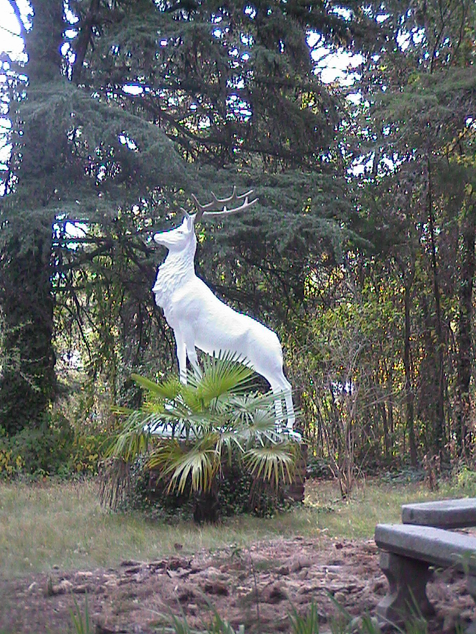 Scultura ciervo JBMJC, HUERTA GRANDE, CORDOBA